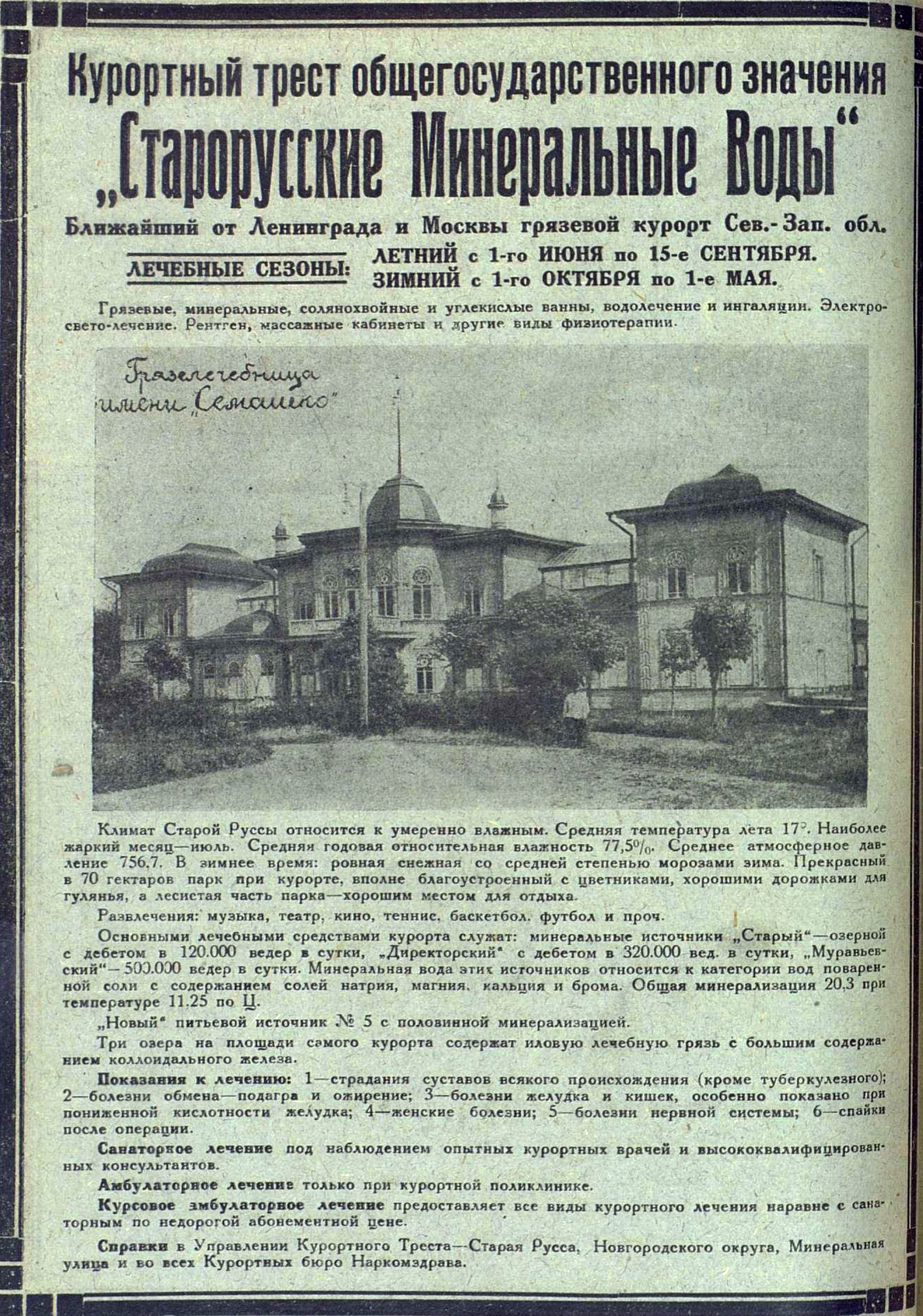 Реклама курорта Старорусские минеральные воды, 1930 год.